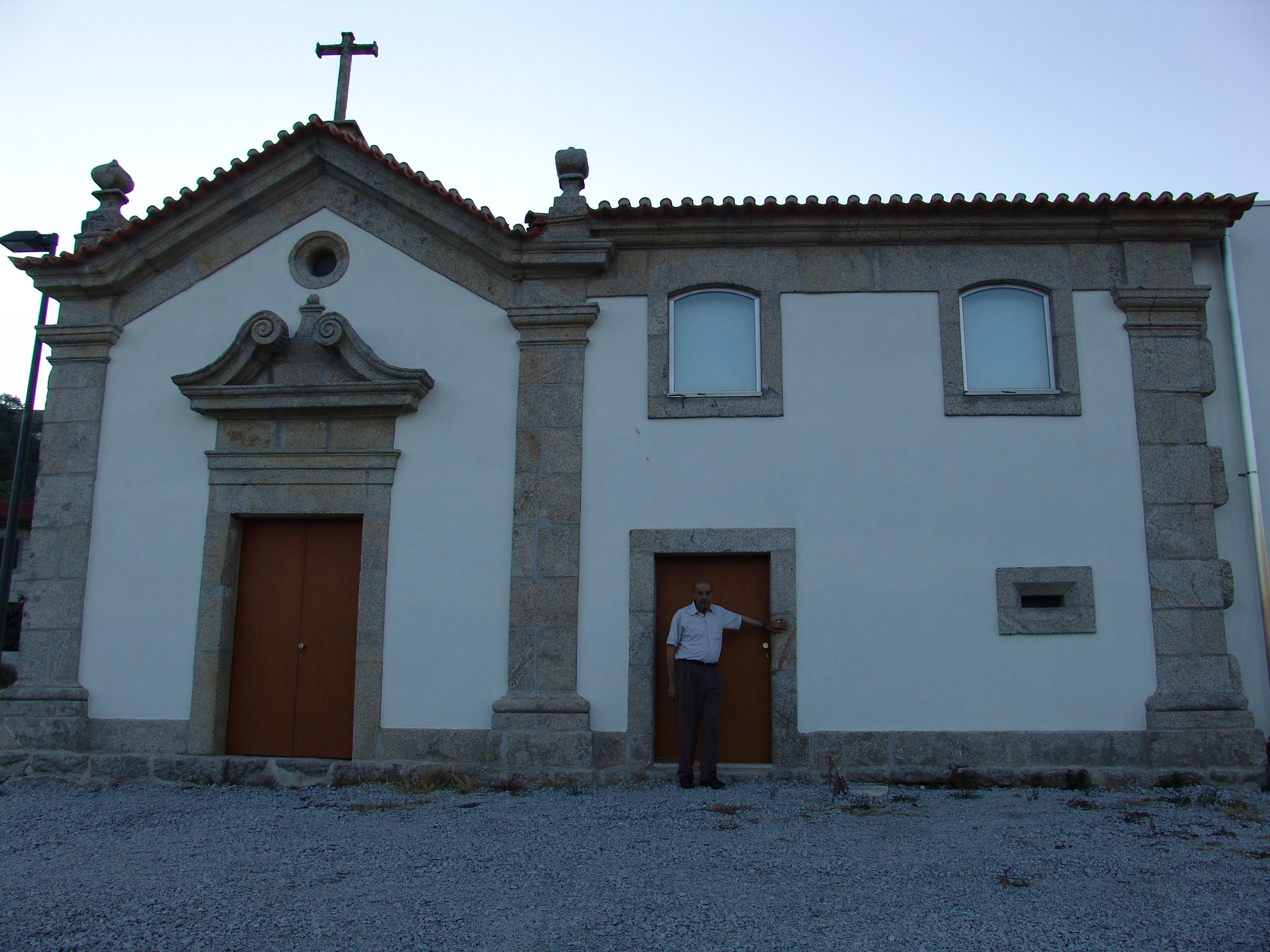 Casa do Condado dos Ferreira Botelho e Albino Ângelo Ferreira Botelho, é o actual Museu Municipal de Vila Pouca de Aguiar